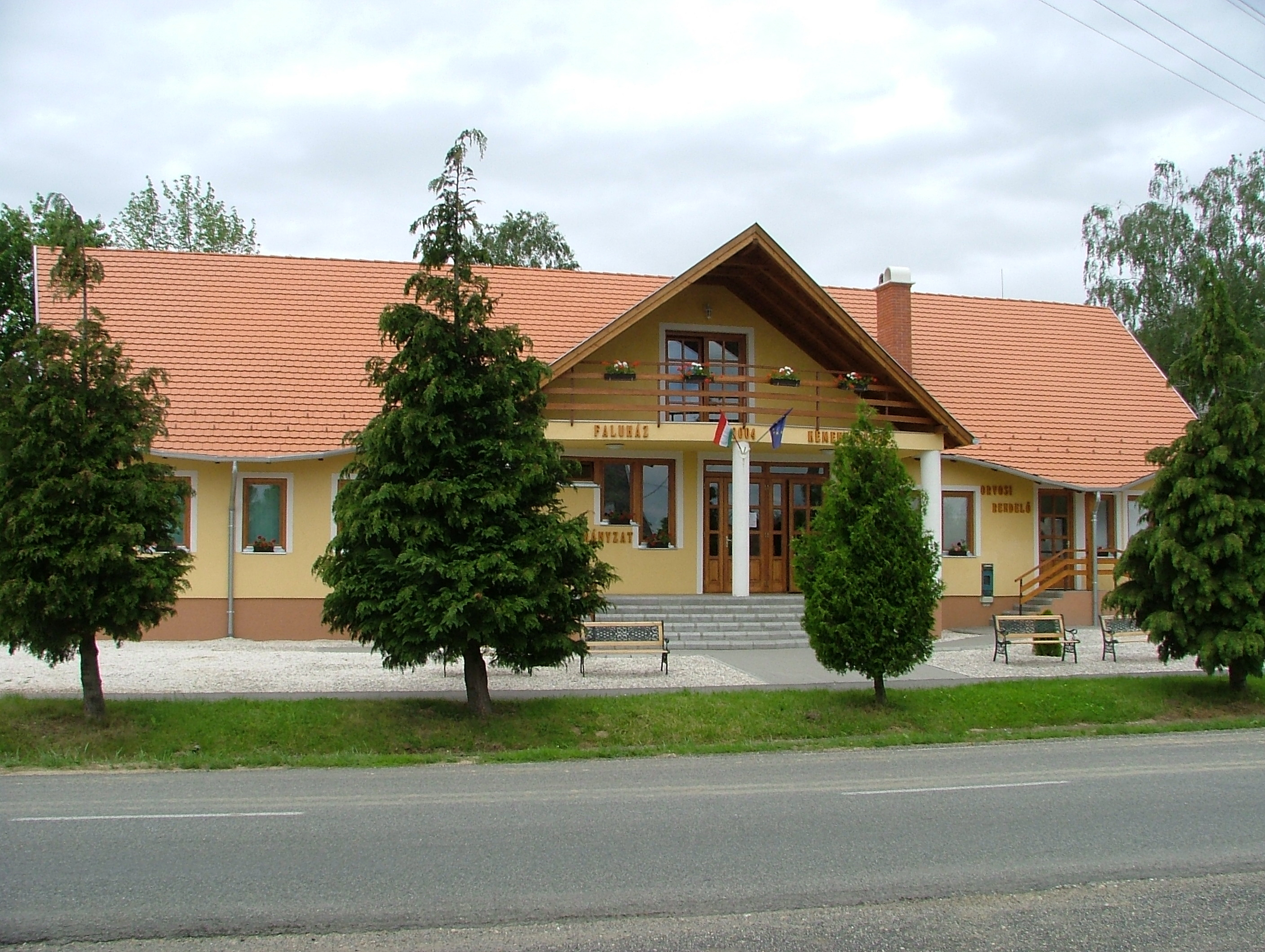 Gemeindeamt Kemenespálfa